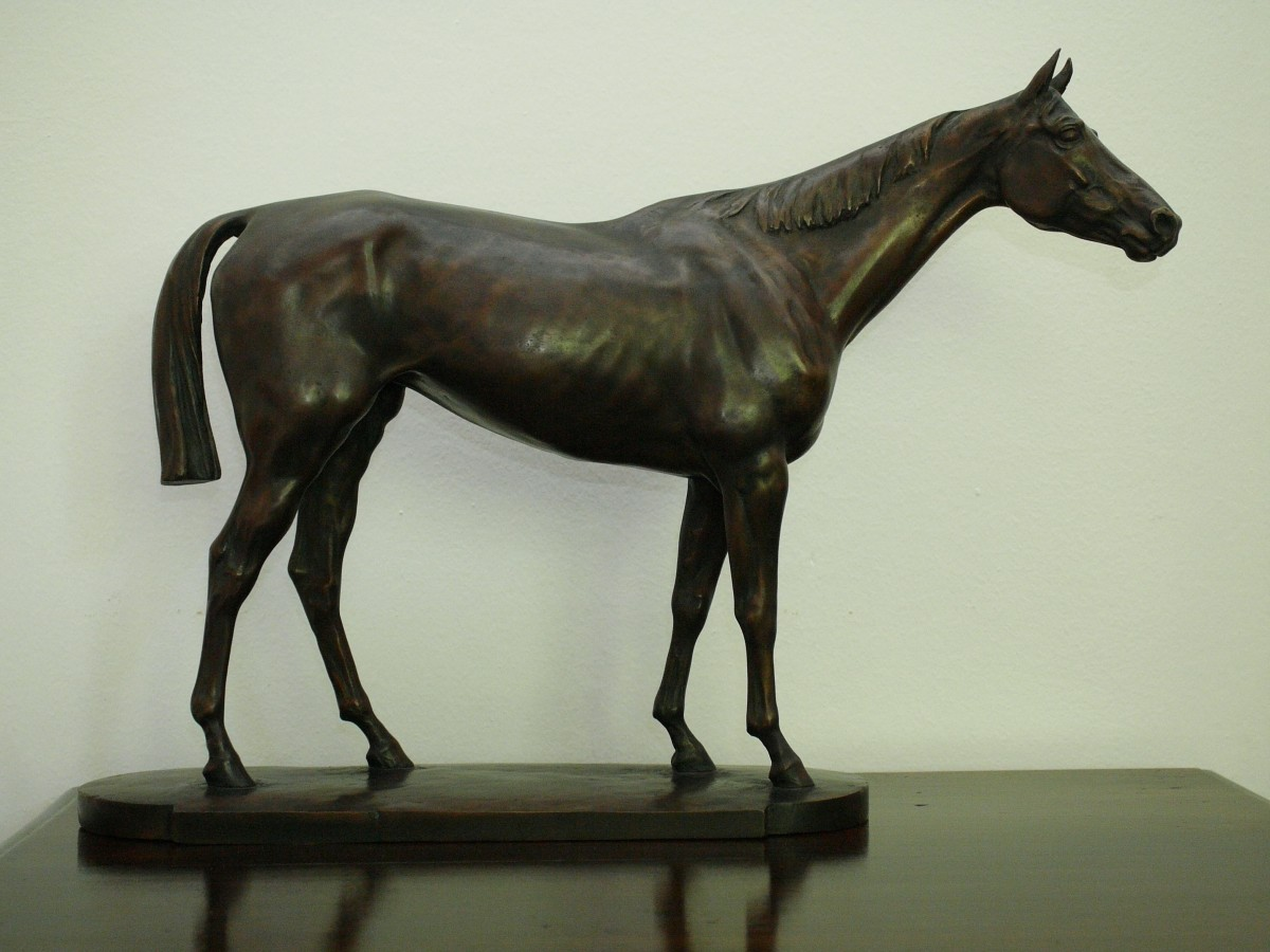 Fénykép ifj. Vastagh György "Kincsem" szobráról (1942)